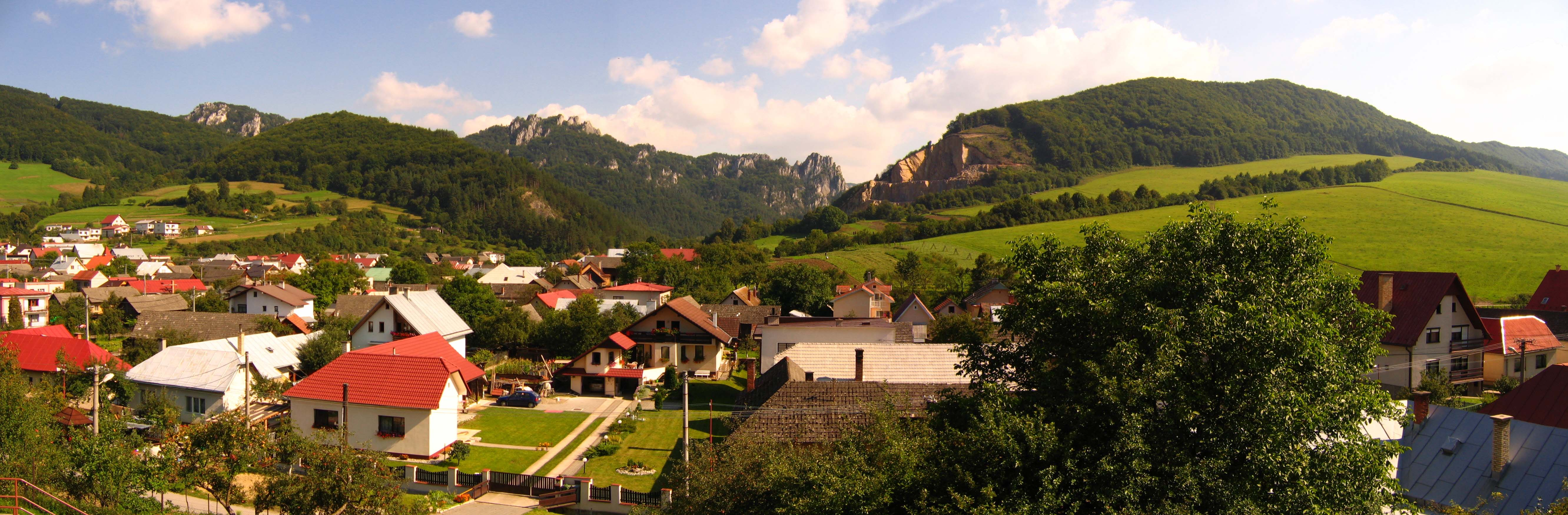 Jablonove panorama